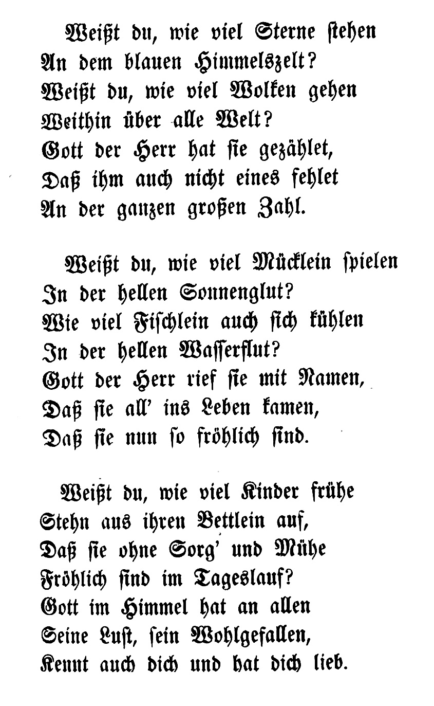 Wilhelm Hey: Weißt du, wie viel Sterne stehen (Druck Gotha 1852)